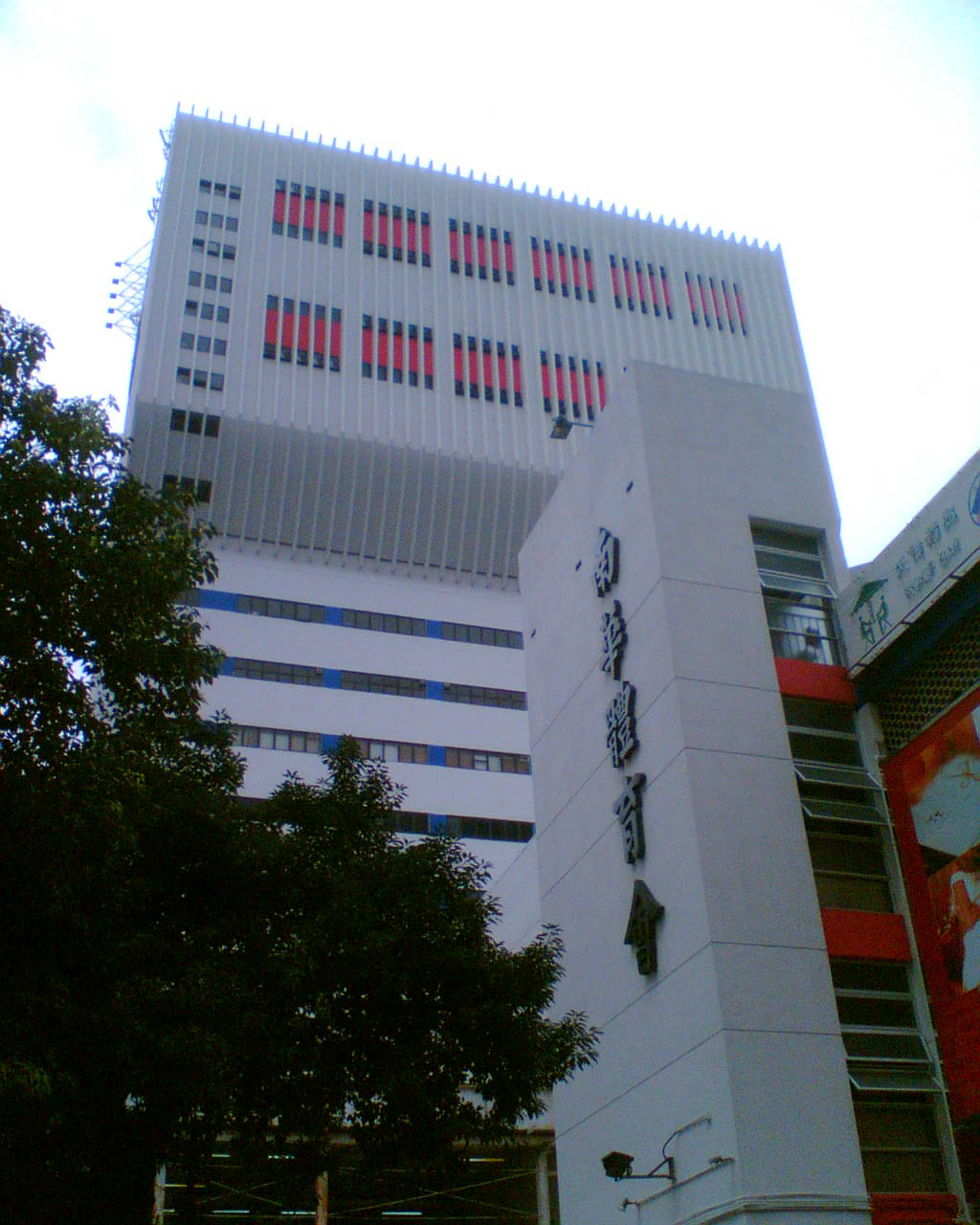 銅鑼灣加路連山南華體育會